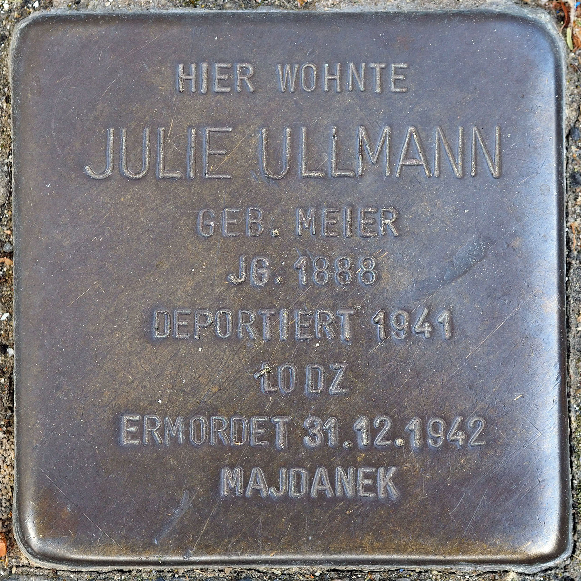 Stolpersteine MG: Ullmann, Julie